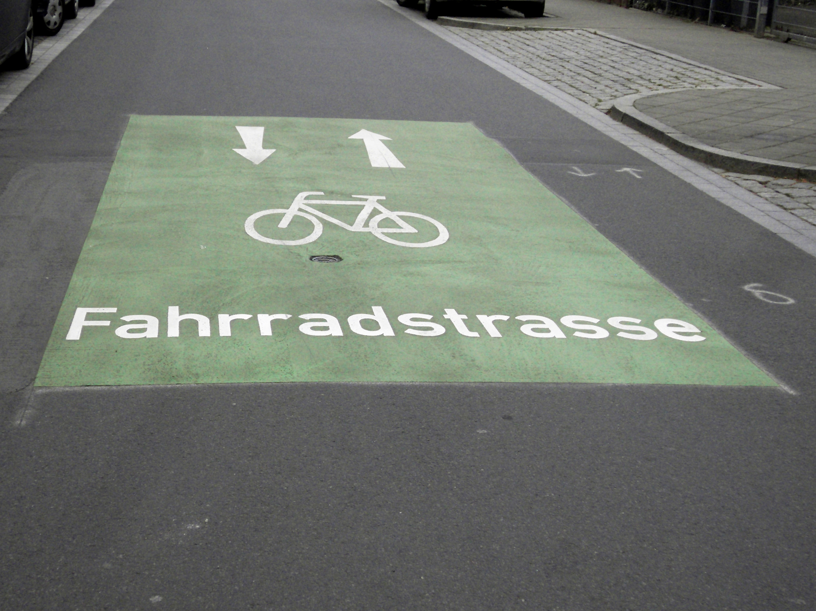 Kennzeichnung einer Fahrradstraße auf der Fahrbahn in Darmstadt